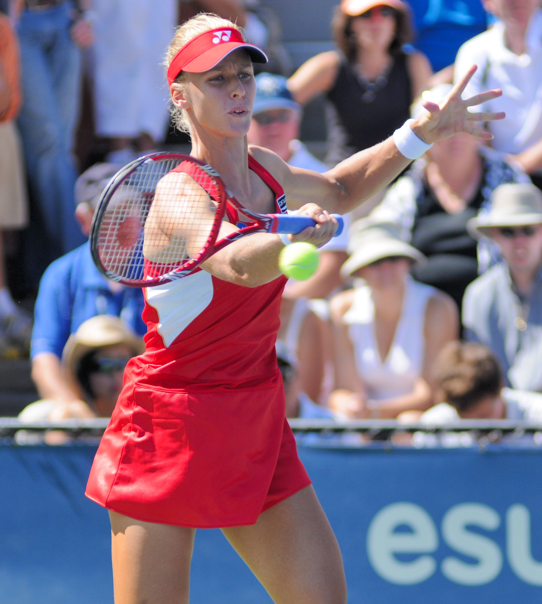 Elena Dementieva - US Open 2010